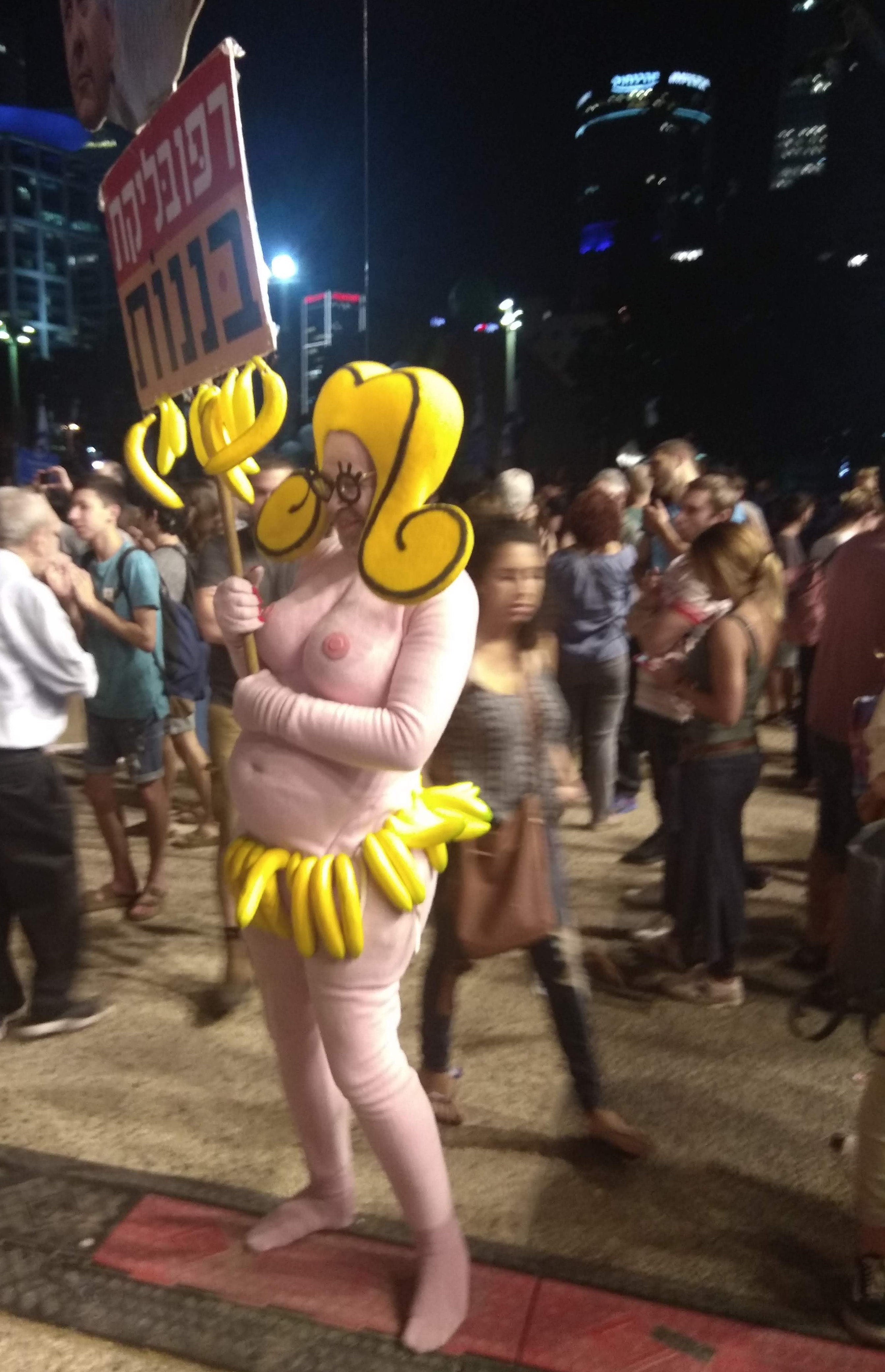 זאב אנגלמאיר בדמות שושקה